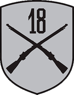 18 Dywizja Zmechanizowana – oznaka rozpoznawcza Dowództwa 18 DZ na mundur polowy – 2019, Polska.